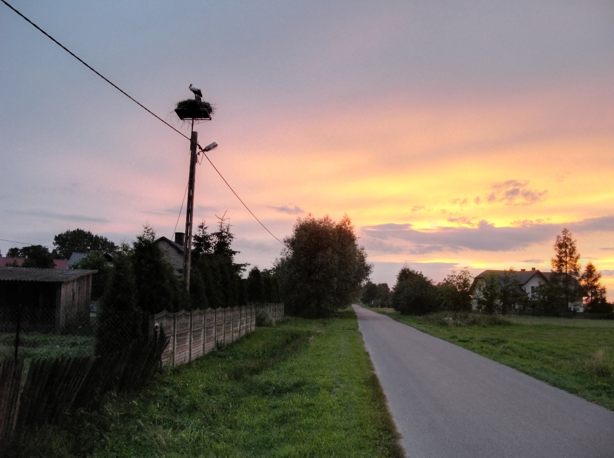 Pniowe - bocianie gniazdo